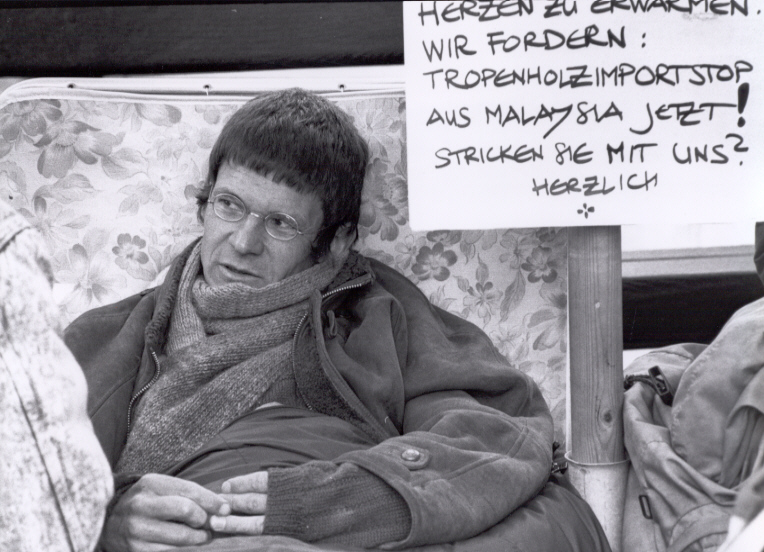 Bruno Manser während einem Hungerstreik